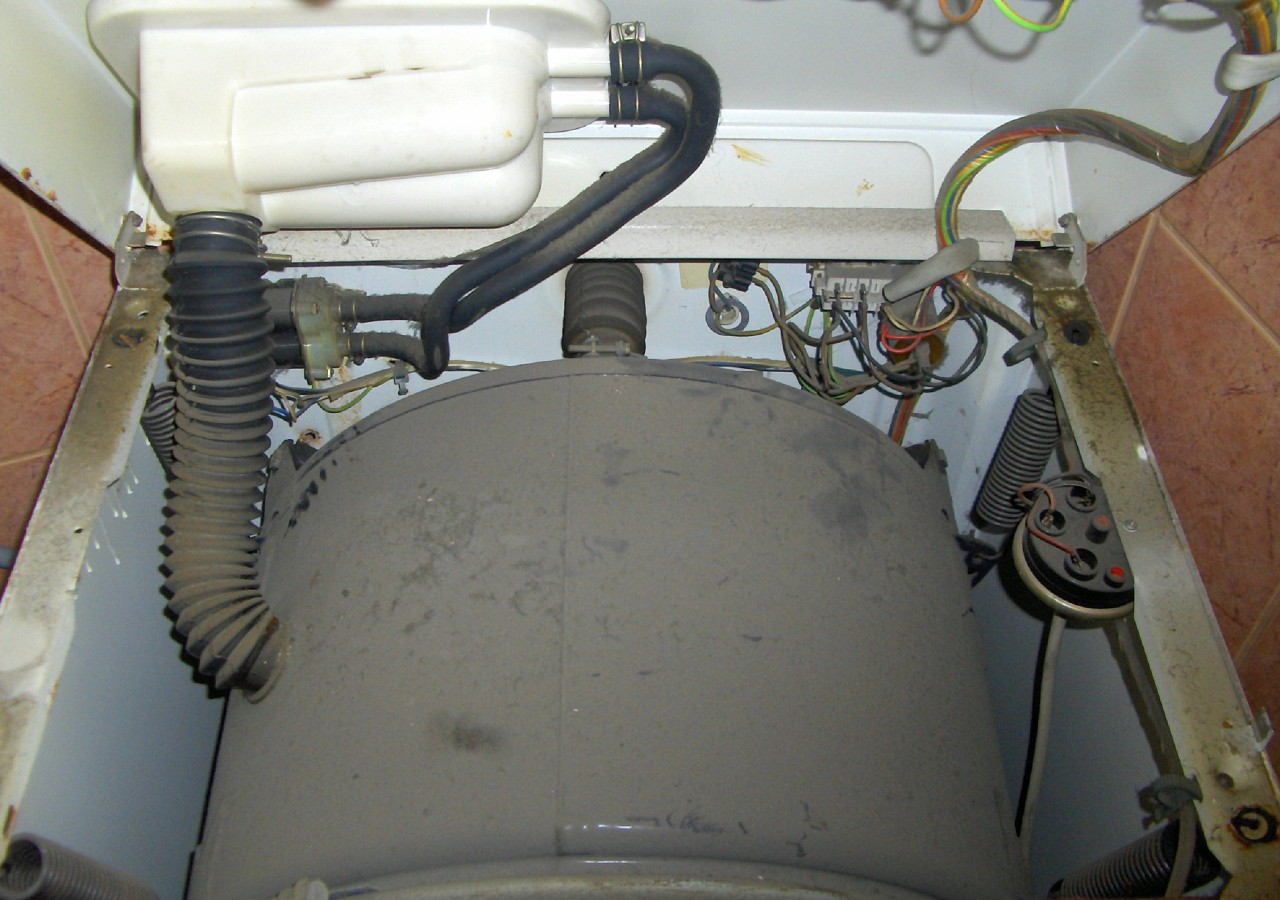 Polar PS 663 P Bio środek